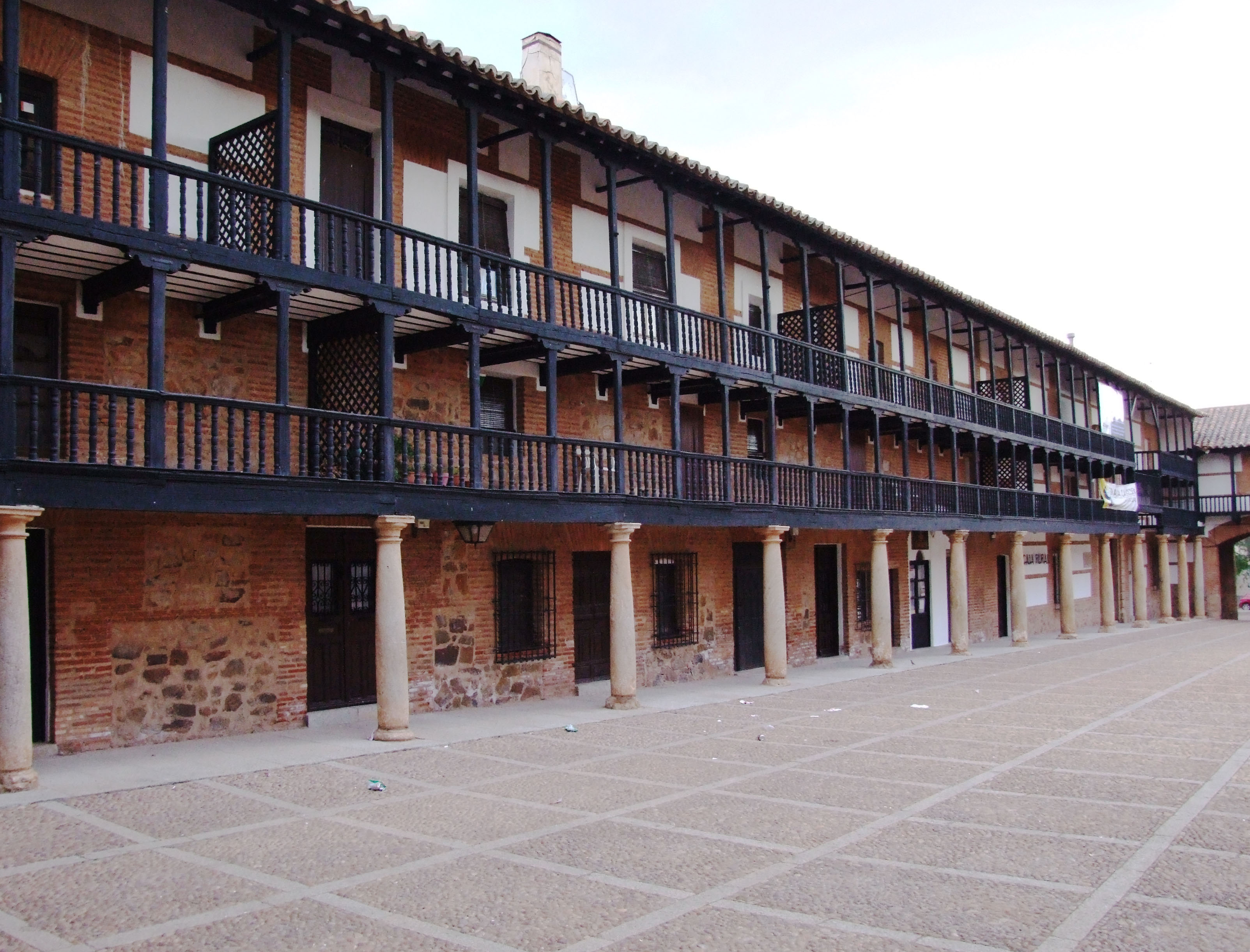 Monumental plaza mayor de San Carlos del Valle